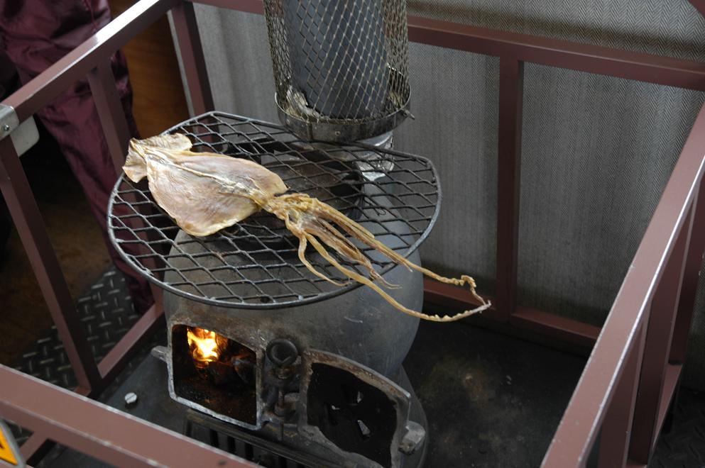 スルメの調理例：石炭ストーブ（ダルマストーブ）上で焼いたもの